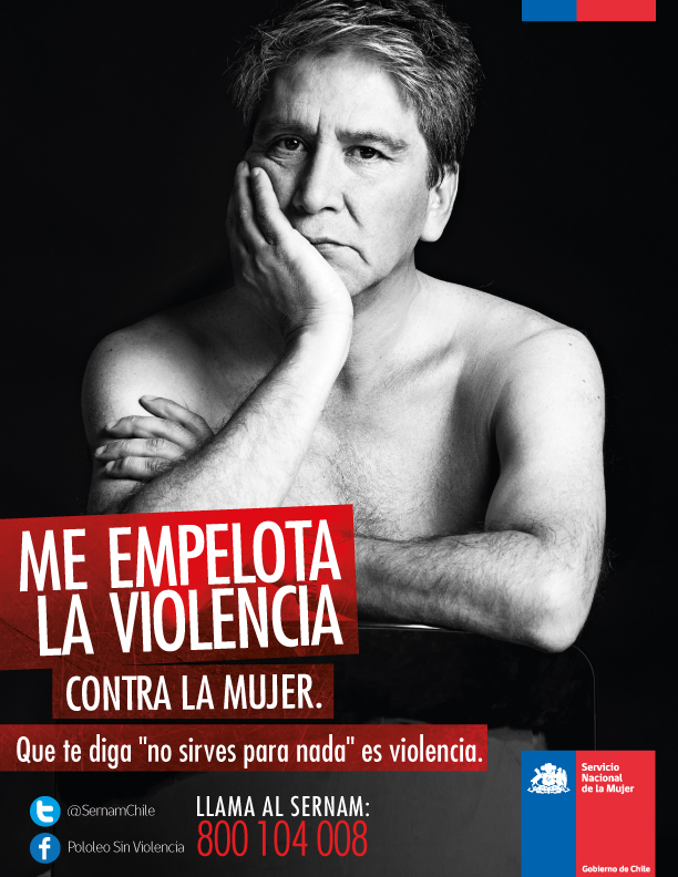 Campaña “Me Empelota la Violencia Contra la Mujer” del Sernam - Emilio Sutherland